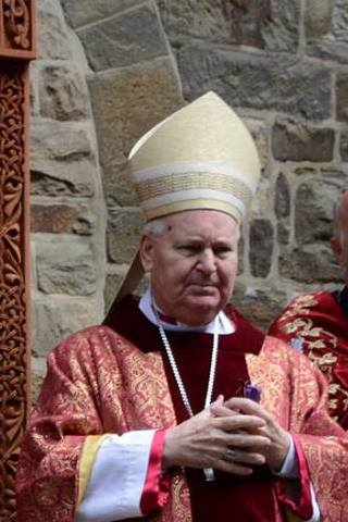 Armeense chatsjkar in Maastricht ingezegend door Bisschop van Roermond Mgr.Wiertz en vicaris Armeense kerk Nederland Mgr. Aren Sahinian.